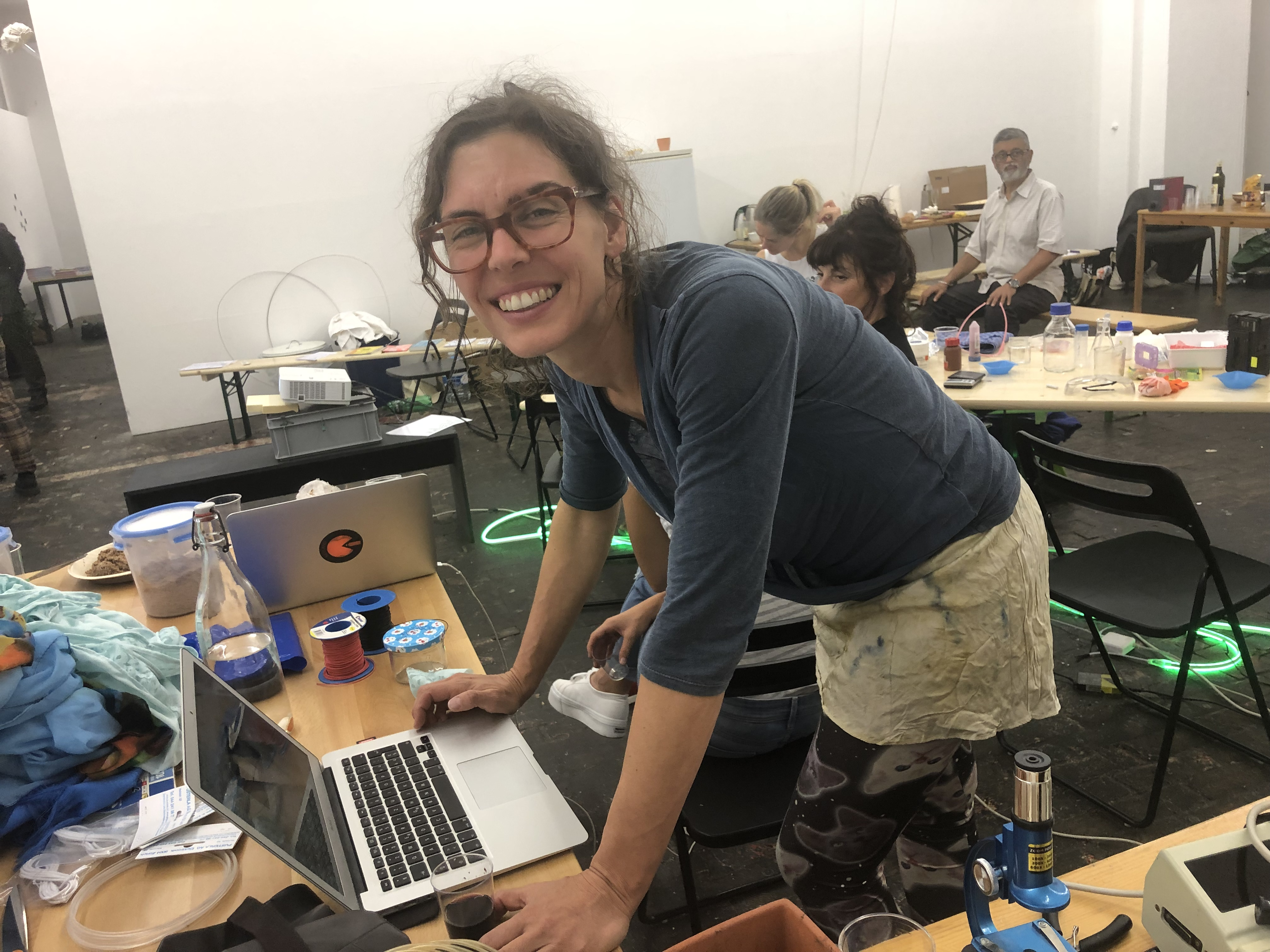 Wormolution, 1000 écologies 12 au 15 septembre 2019